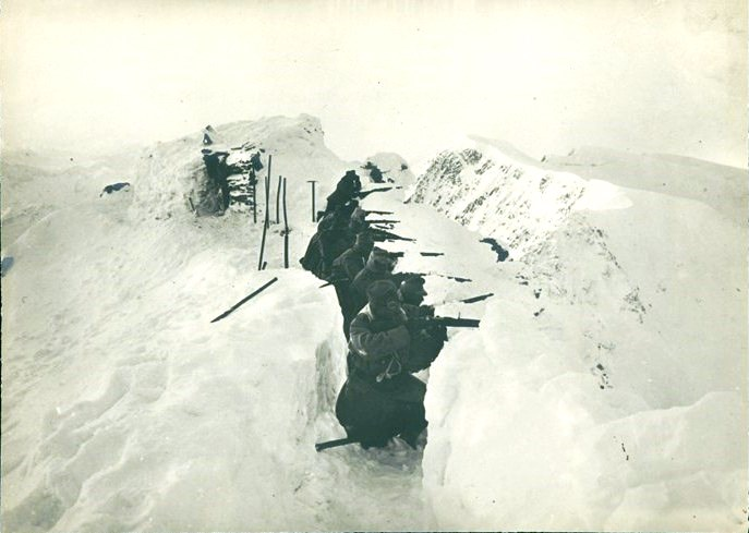 Снимка от австро-унгарски стрелкови окоп на връх Ортлер в Алпите през Първата световна война.